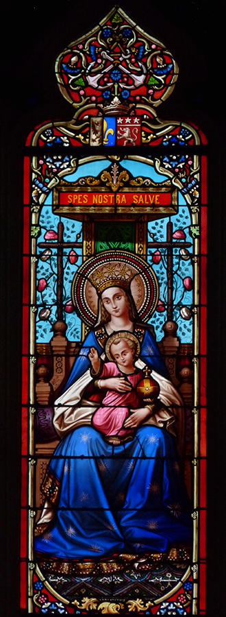 Eglise Saint-Pierre - vitrail Vierge à l'enfant